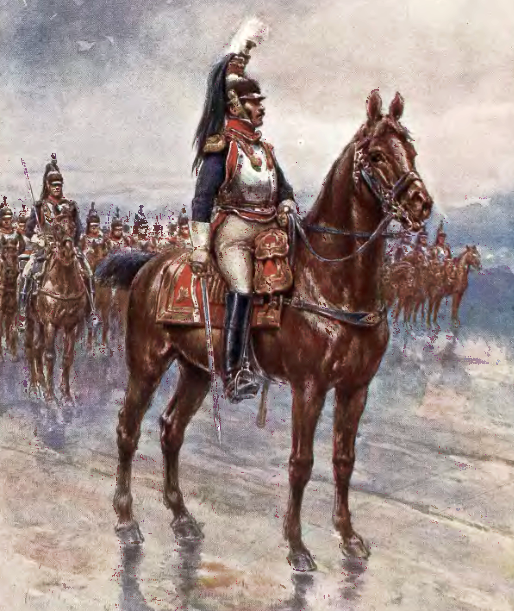 Oficer wyższy pułku kirasjerów Księstwa Warszawskiego